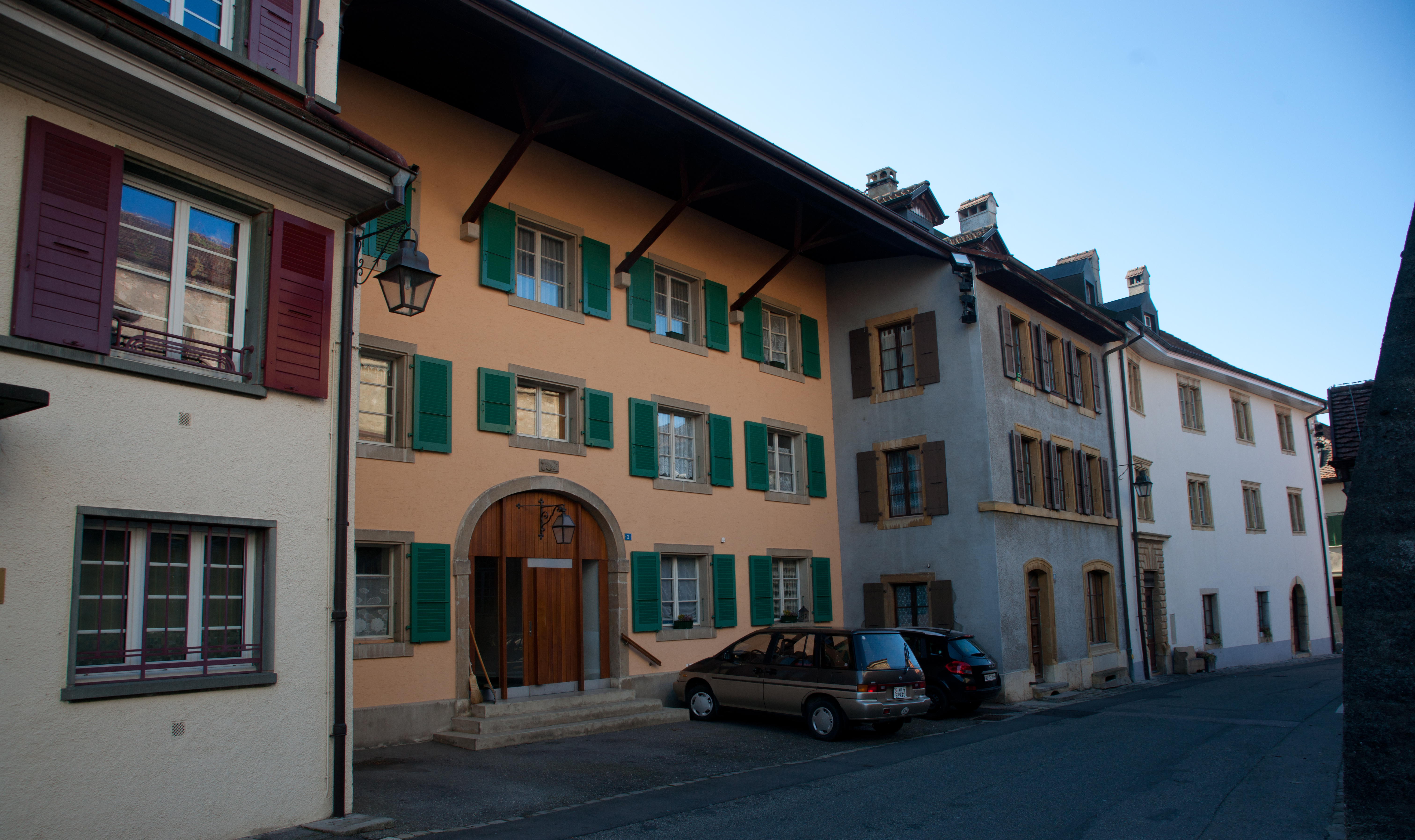 Vielle ville de Cossonay, canton de Vaud, Suisse.